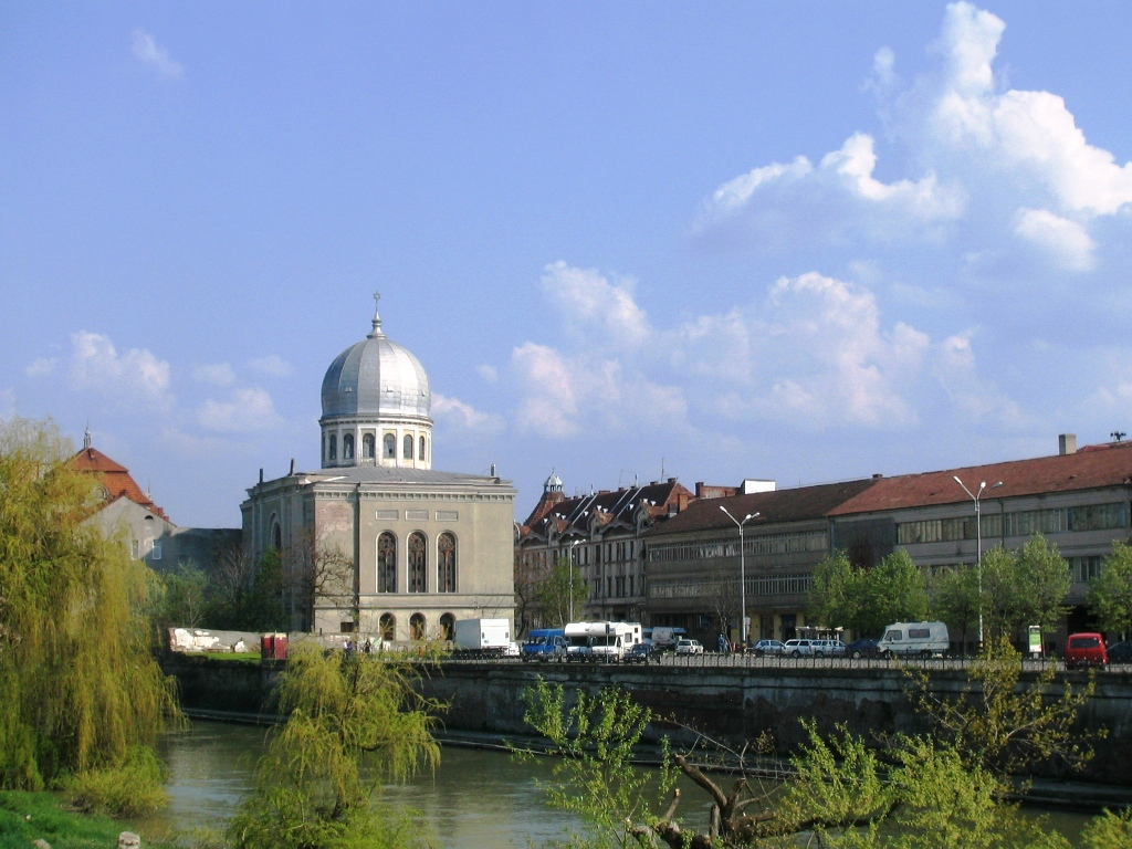 Neolog Synagogue, Oradea, Romania